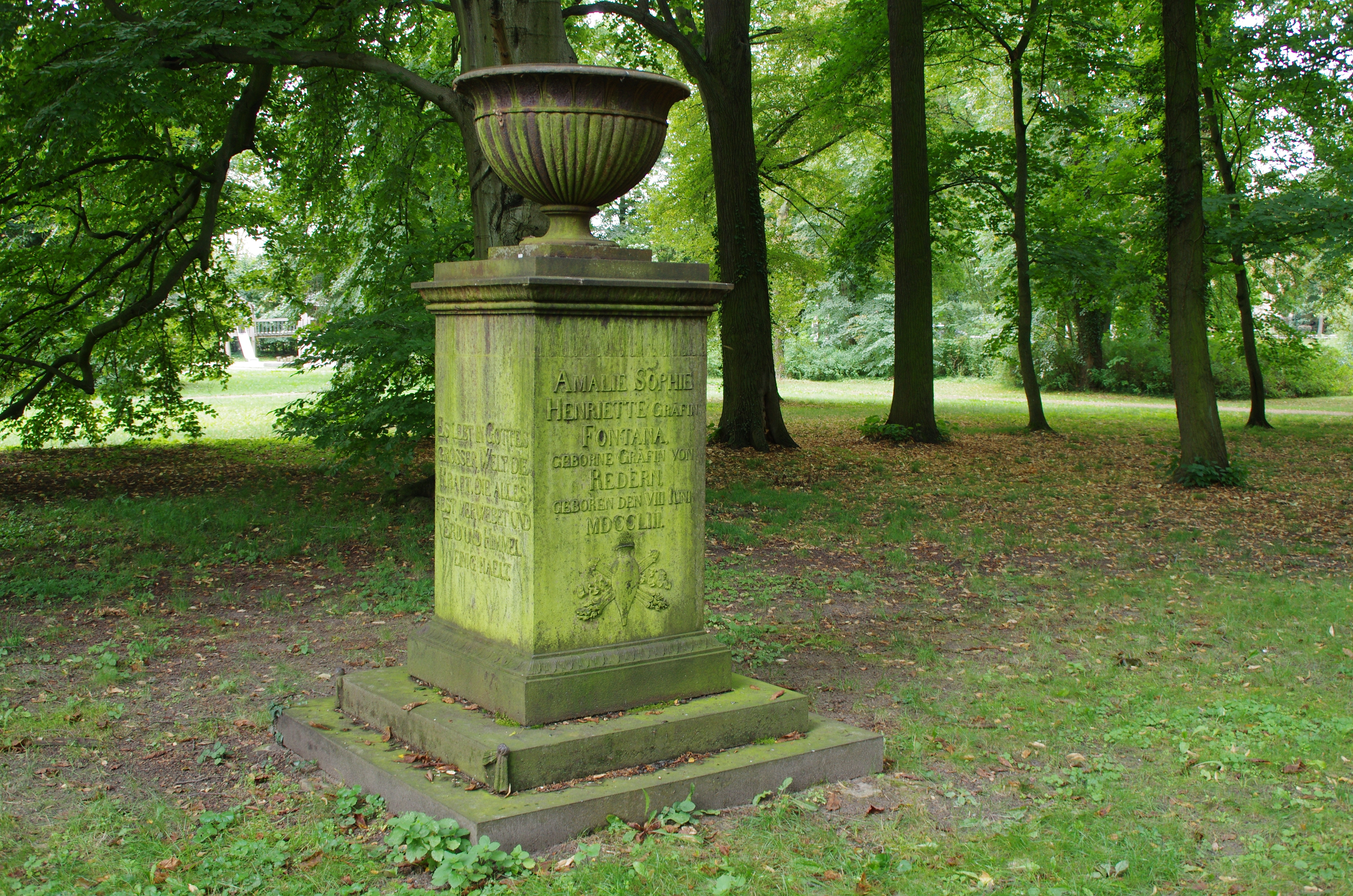 Golßen in Brandenburg. Das Fontana-Denkmal im Schlosspark steht unter Denkmalschutz. Es ist das Grabmal für Amalie Sophie Henriette Gräfin von Fontana.